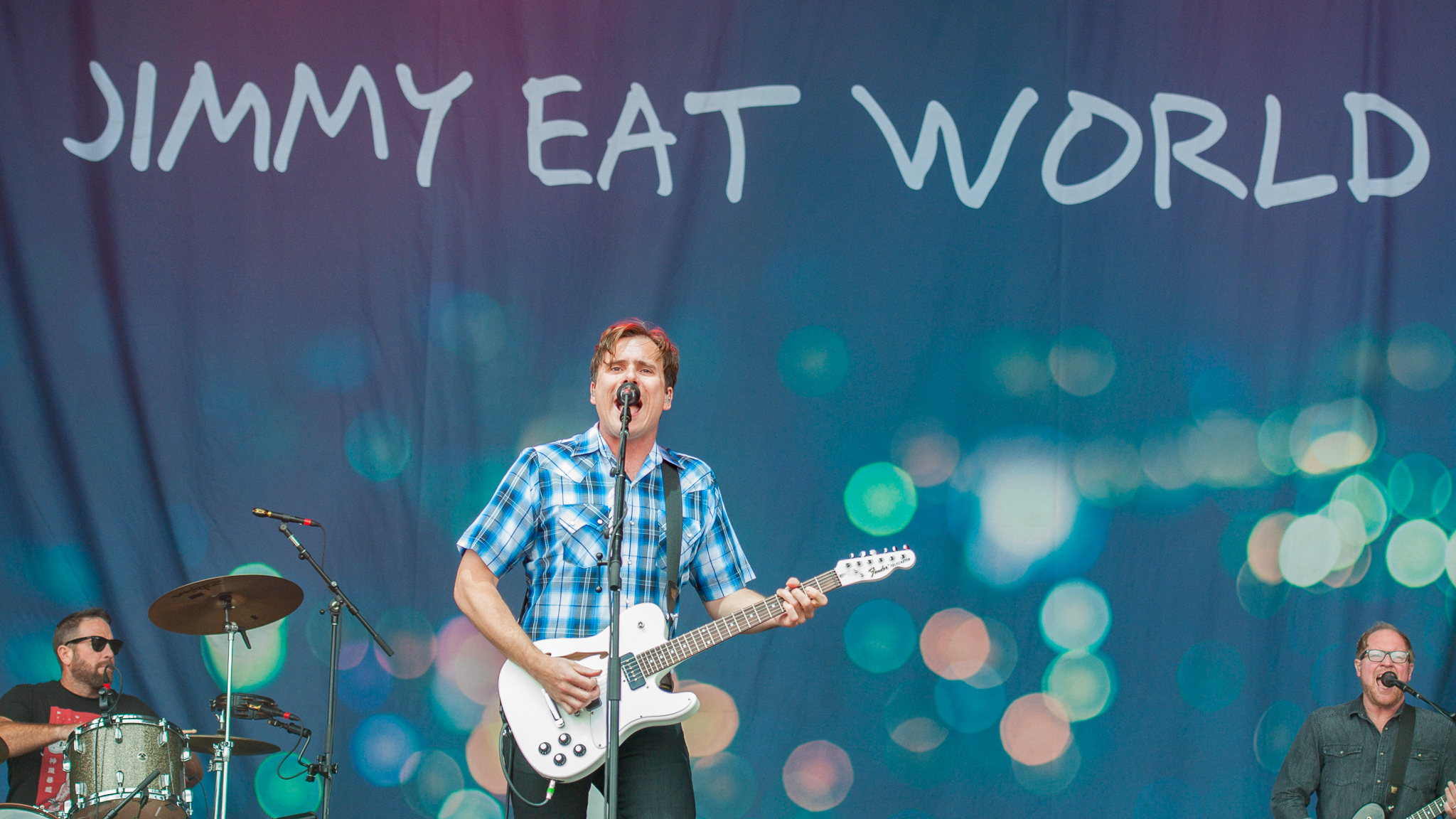 ARGO-Konzerte,Festival,James Christopher Adkins,Jim Adkins,Jimmy Eat World,Konzert,Livekonzert,Livemusik,Musik,RiP,Rock im Park 2018,Zach Lind,Zeppelin Stage